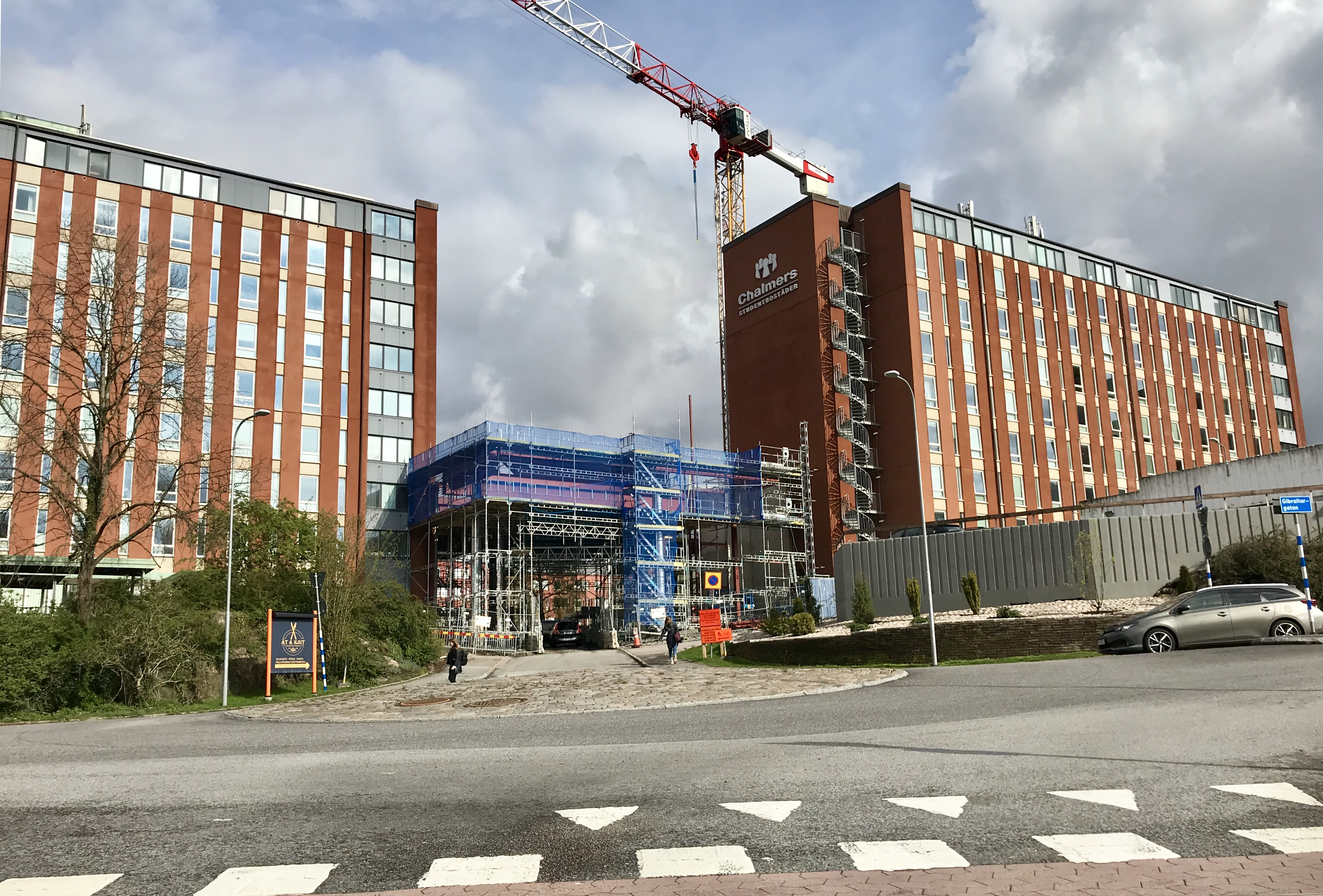 Emilsbro är ett byggprojekt som ska resultera i 42 nya studentlägenheter på Chalmers Studentbostäders bostadsområde Emilsborg i Johanneberg i Göteborg. Den nya byggnaden uppförs mellan de befintliga husen på Gibraltargatan 82 och Gibraltargatan 94. Bygget beräknas stå klart i februari 2021. Befintliga sexvåningshus färdigställda 1963. Arkitekter: Lund & Valentin arkitekter